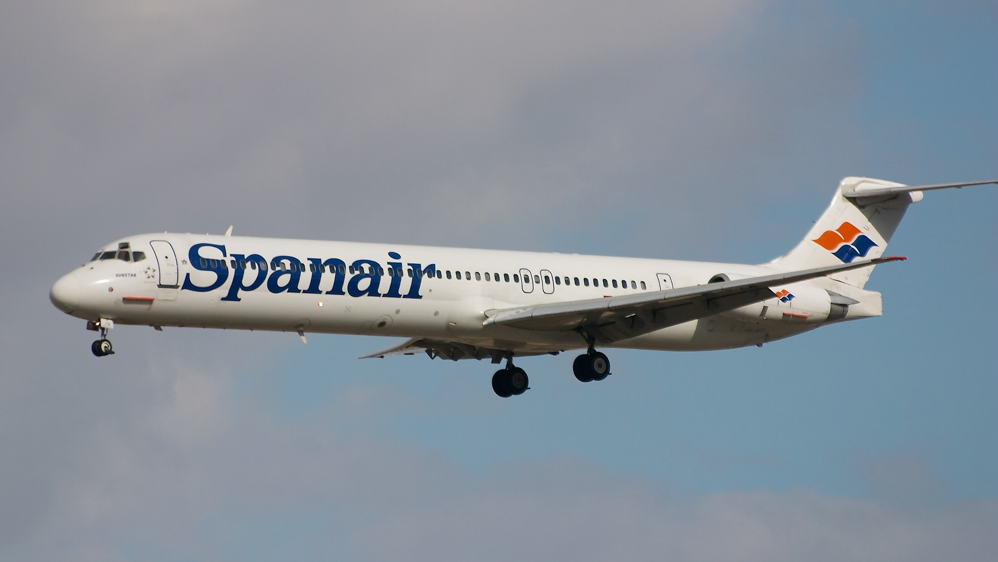 McDonnell Douglas MD-83 de Spanair a punto de aterrizar en la pista 33 del aeropuerto de Madrid Barajas.